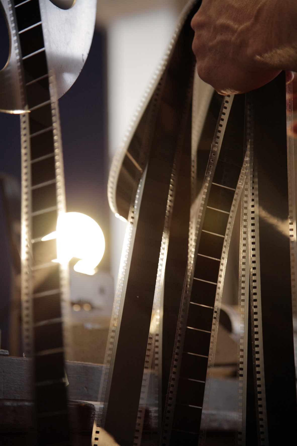 Filmrollen